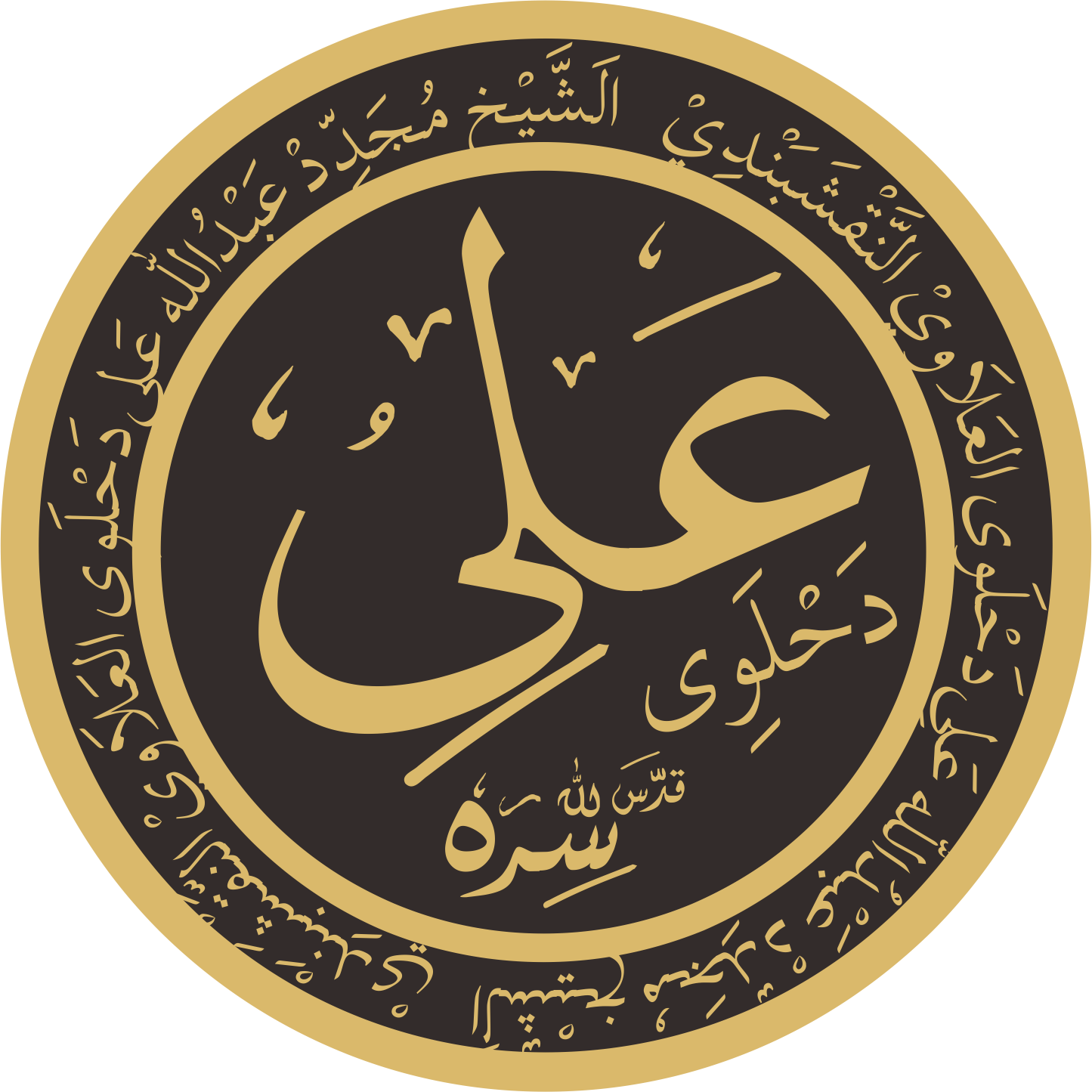 Syekh Ghulam Ali naqsyabandi